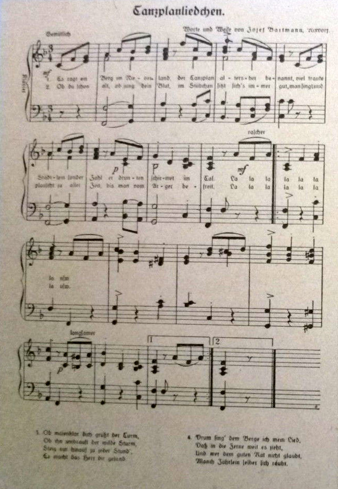 Text Písničky o Tanečnici (Tanzplanliedchen) od Josefa Bartmanna (1868-1947)